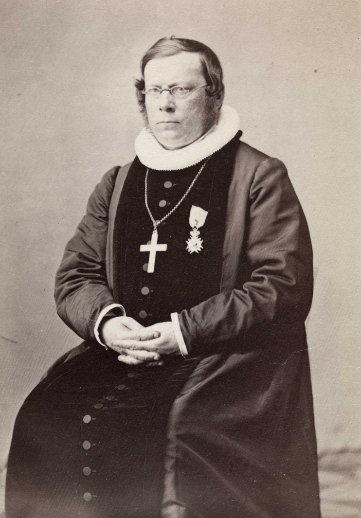 Carl Peter Parelius Essendrop (1818–1893), biskop og statsråd.